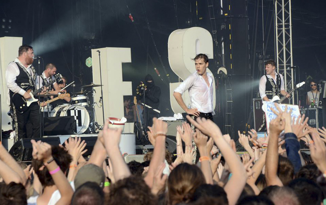 En 2013, les Suédois de The Hives sont la bonne surprise de Beauregard.